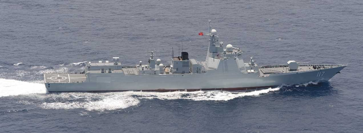 ８月１日（木）午前９時頃、海上自衛隊第５航空群所属「Ｐ－３Ｃ」（那覇）、第１３護衛隊所属「さわぎり」（佐世保）及び佐世保警備隊所属「あまくさ」（佐世保）が、久米島の南約１２０ｋｍの海域を北上する中国海軍ルーヤンⅢ級ミサイル駆逐艦２隻、ジャンカイⅡ級フリゲート３隻及びフユ級高速戦闘支援艦１ 隻の計６隻を確認した。 その後、これらの艦艇が沖縄本島と宮古島の間の海域を北上し、東シナ海へ向けて航行したことを確認した。 なお、６隻の艦艇のうち、ルーヤンⅢ級ミサイル駆逐艦１隻、ジャンカイⅡ級フリゲート２隻及びフユ級高速戦闘支援艦１隻の計４隻は 7 月２５日（木）に、ルーヤンⅢ級ミサイル駆逐艦１隻及びジャンカイⅡ級フリゲート１隻の計２隻は７月２７日（土）に、沖縄本島と宮古島の間の海域を南下した艦艇と同一である。